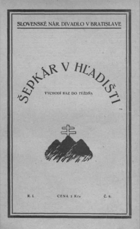 Titulný list časopisu Šepkár v hľadišti.